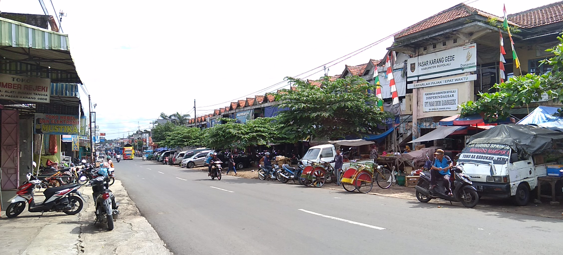 Pasar Karanggede adalah pasar umum miliki Disperindagsar Kabupaten Boyolali yang berada di jalan Karanggede-Sruwen, Desa Kebonan